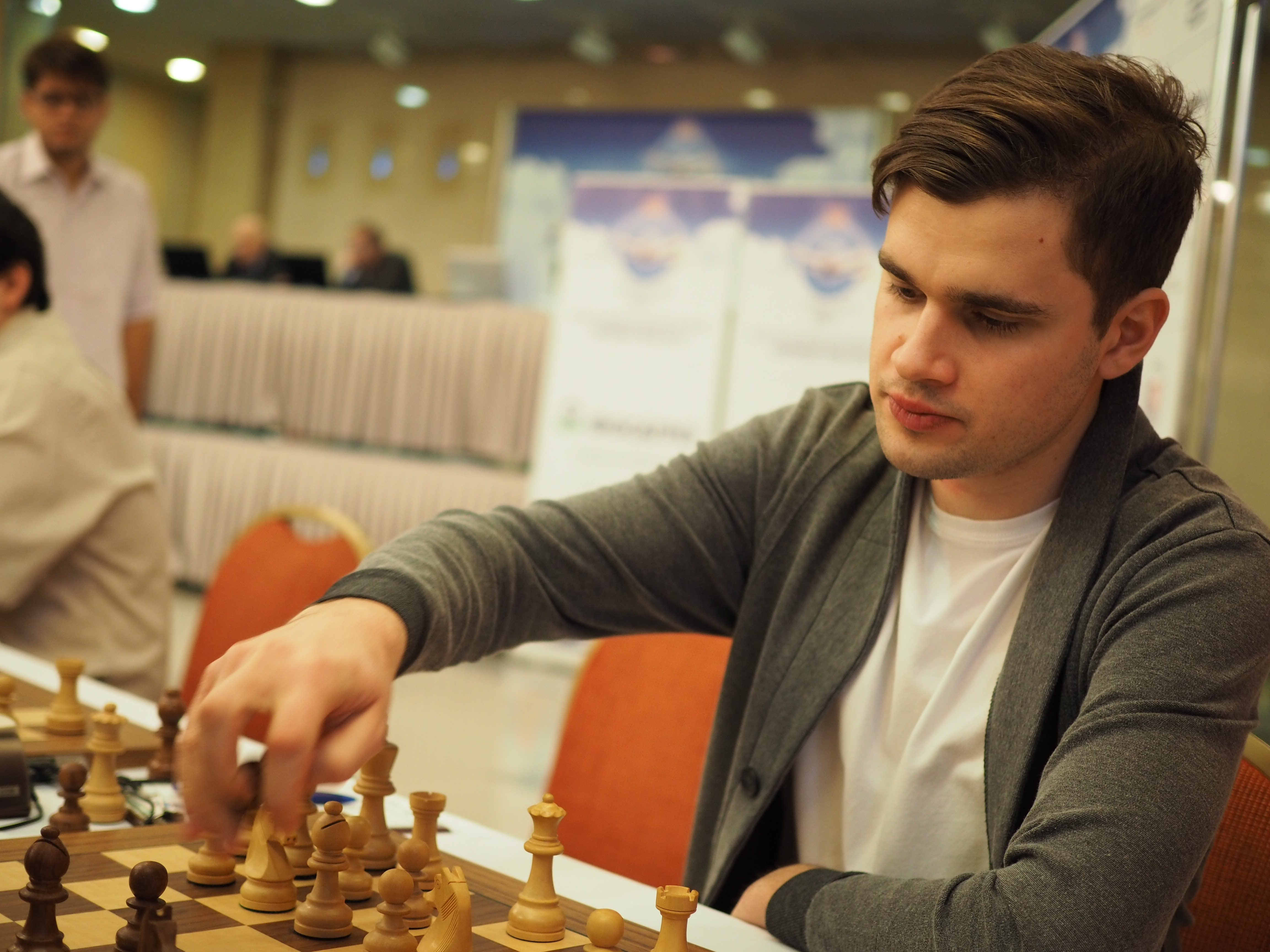 Максим наносит решающий удар